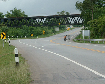 Tha Sawang Silk.